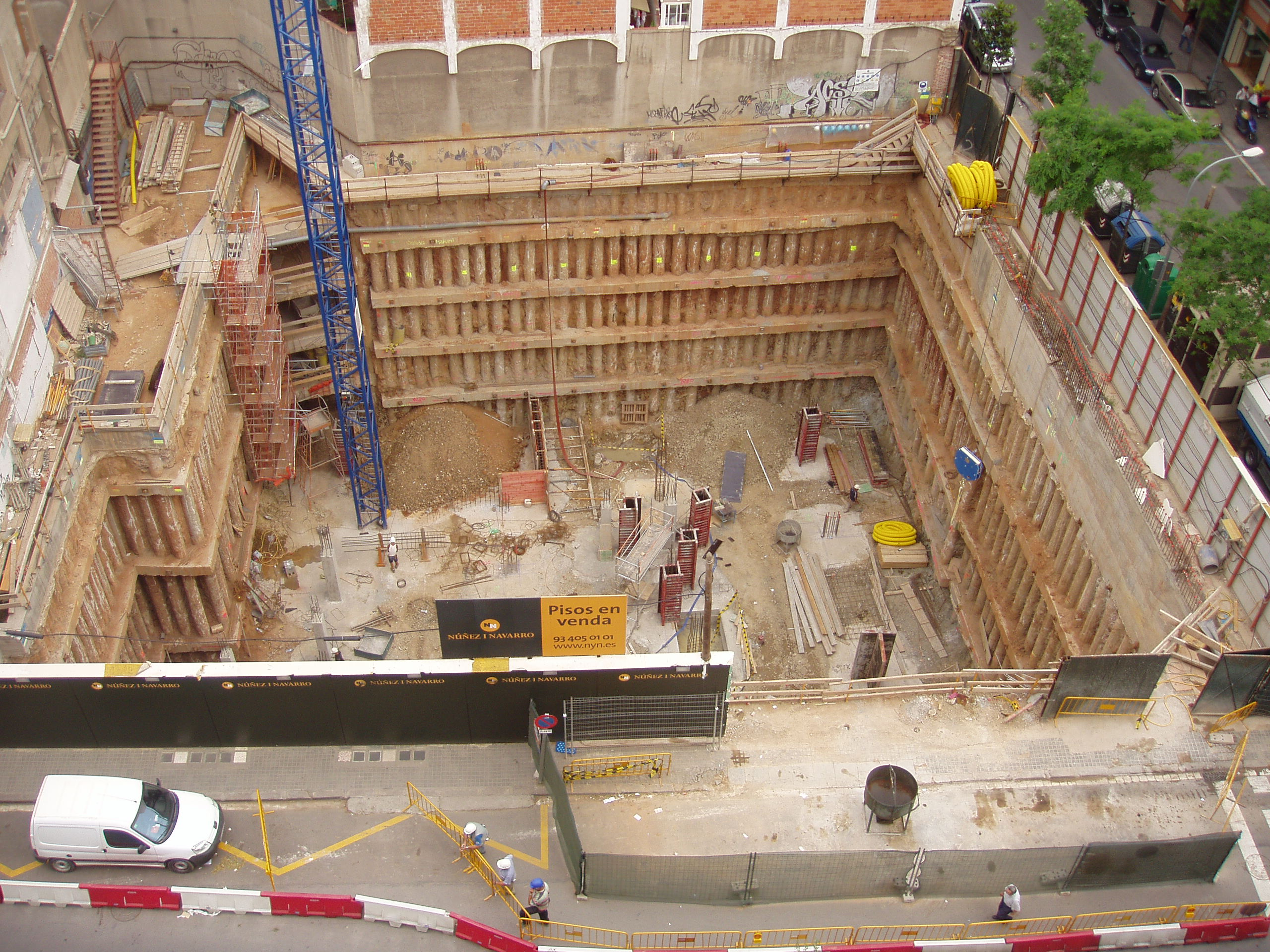 Construcción de una pantalla de pilotes. Barcelona.